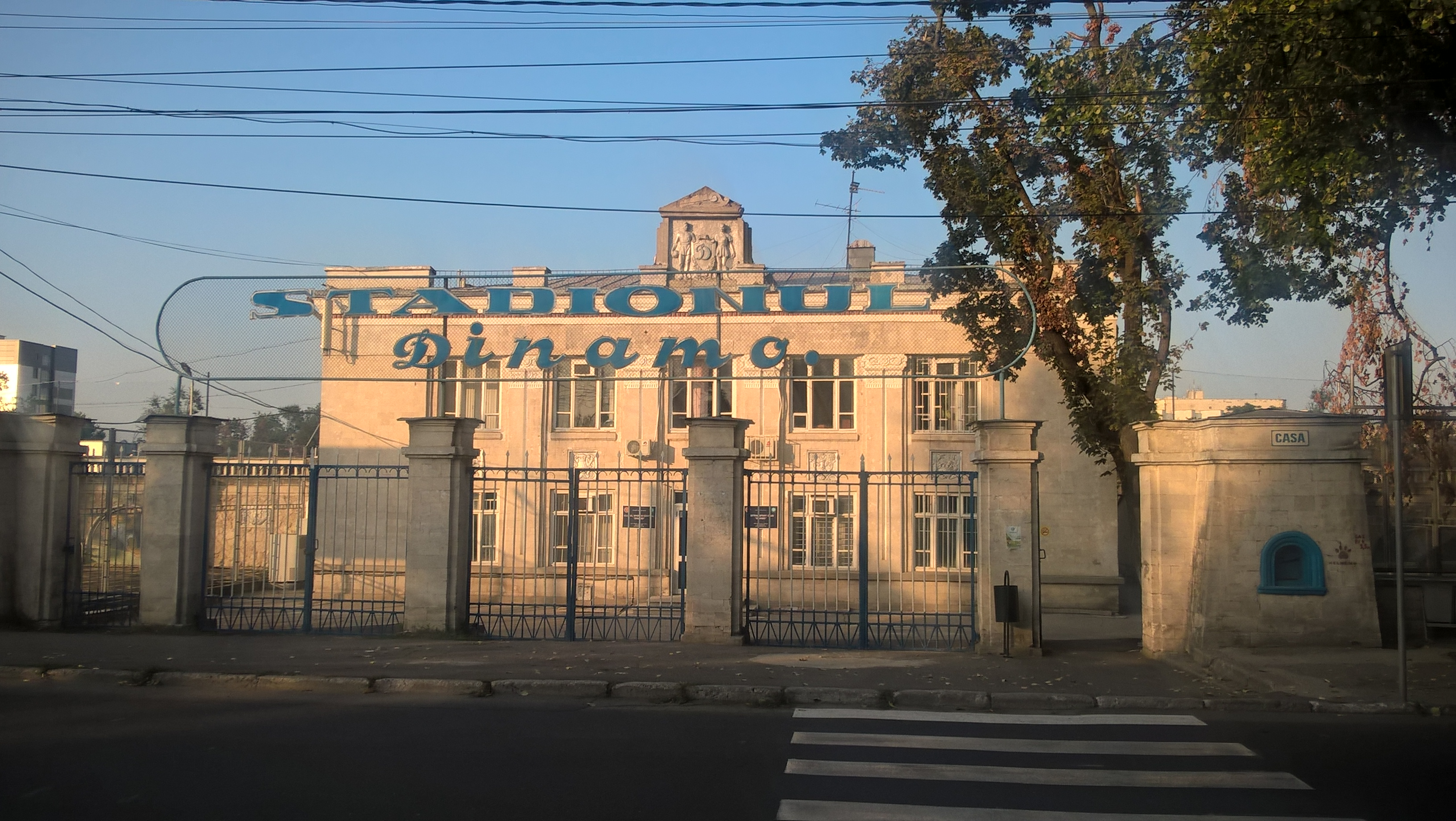 Stadion Dynamo w Kiszyniowie